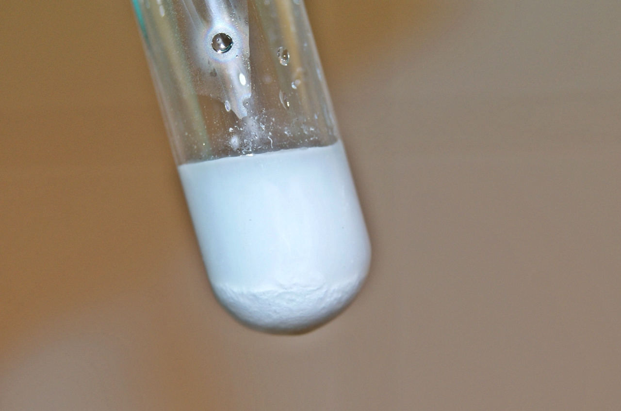 Silberchlorid-Niederschlag; entsteht im Rahmen des Nachweises von Clorid-Ionen mittels Silbernitrat.